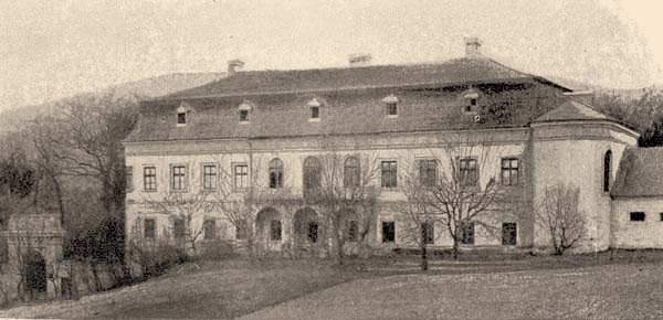 A Migazzi-kastély az 1800-as évek végén. Eredeti képaláírás: „Nógrádverőcze: A Migazzy féle kastély.”